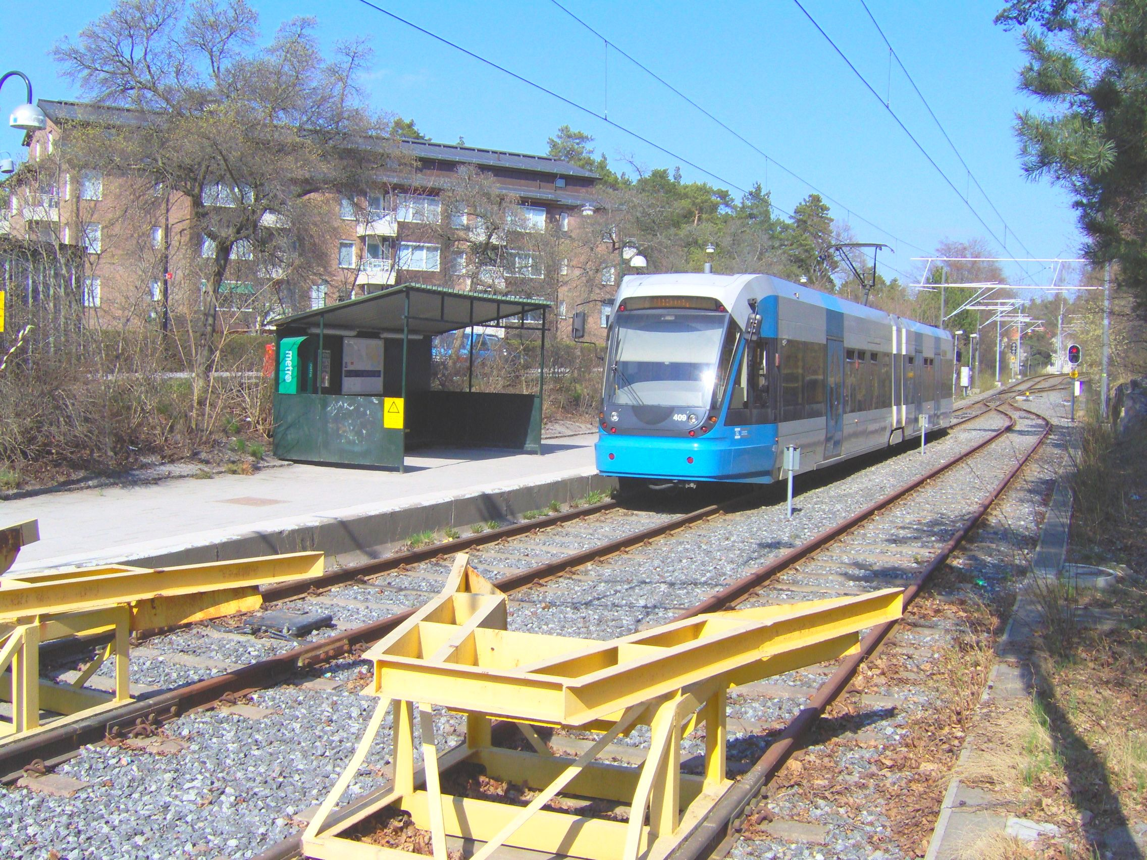 Nockeby slutstation på Nockebybanan Nockeby, end of the line Nockebybanan in Stockholm, Sweden 2006.